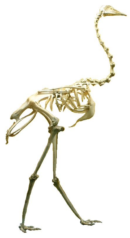 Rhea skeleton.